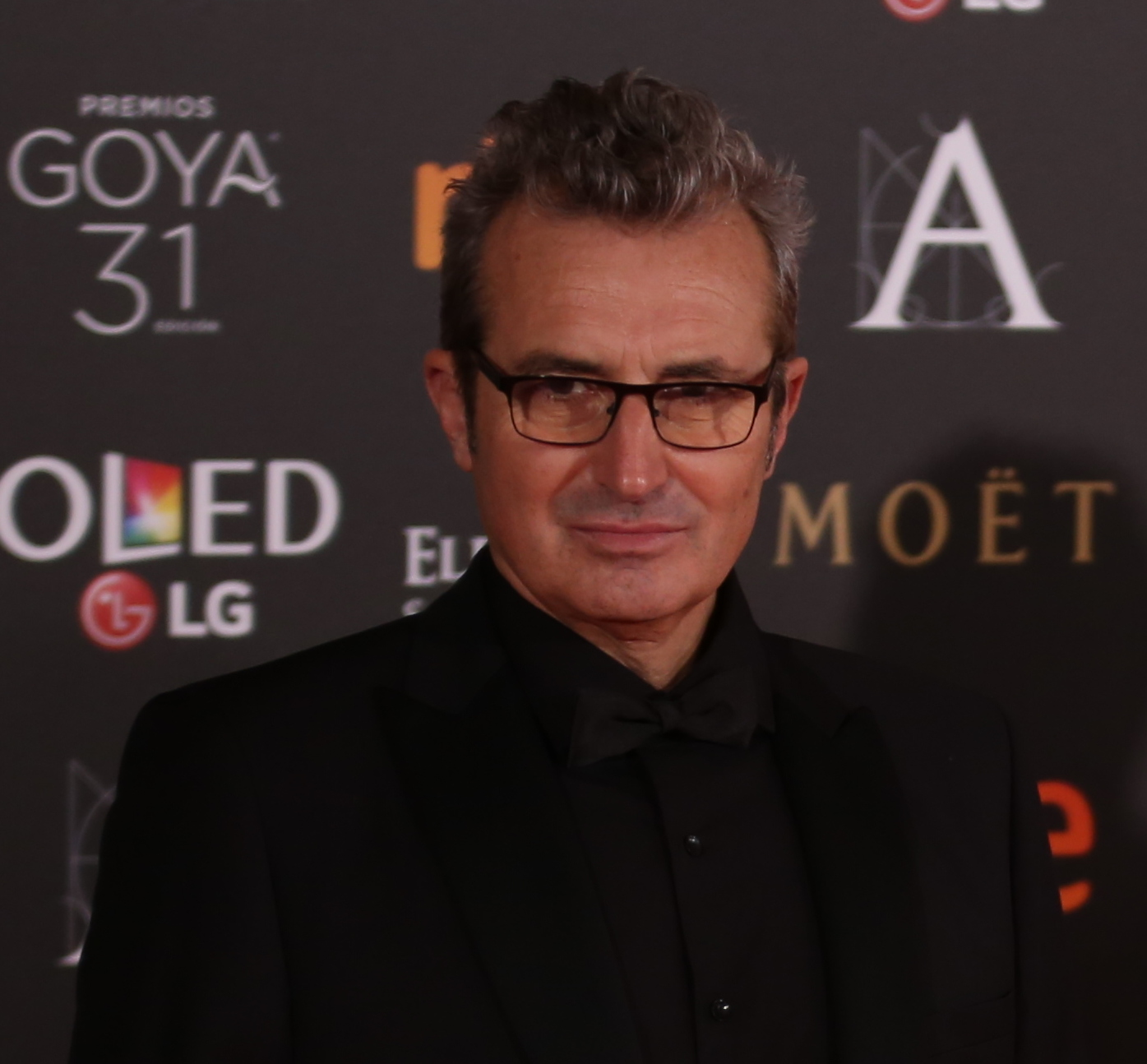 Premios Goya 2017